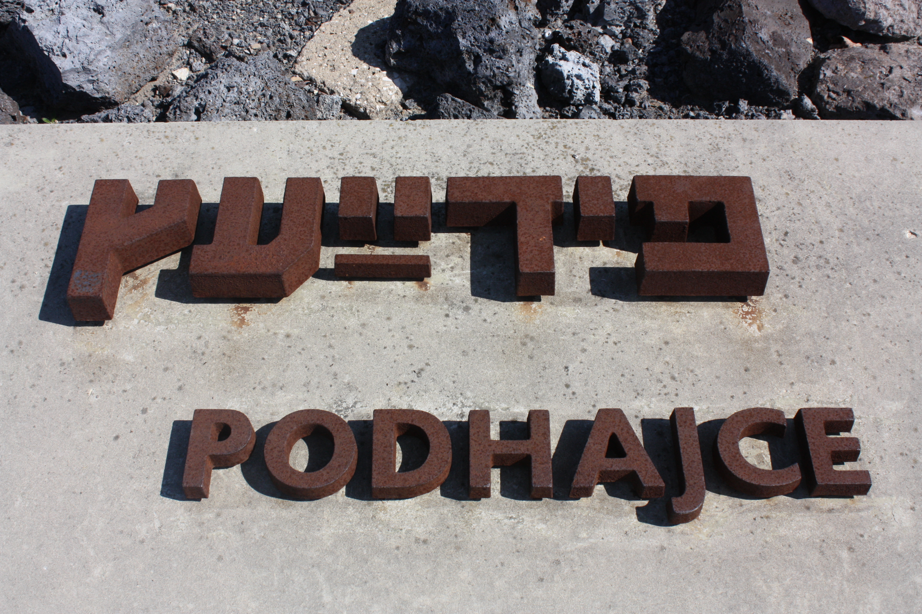 Bełżec - napis upamiętniający pomordowanych Żydów z Podhajec